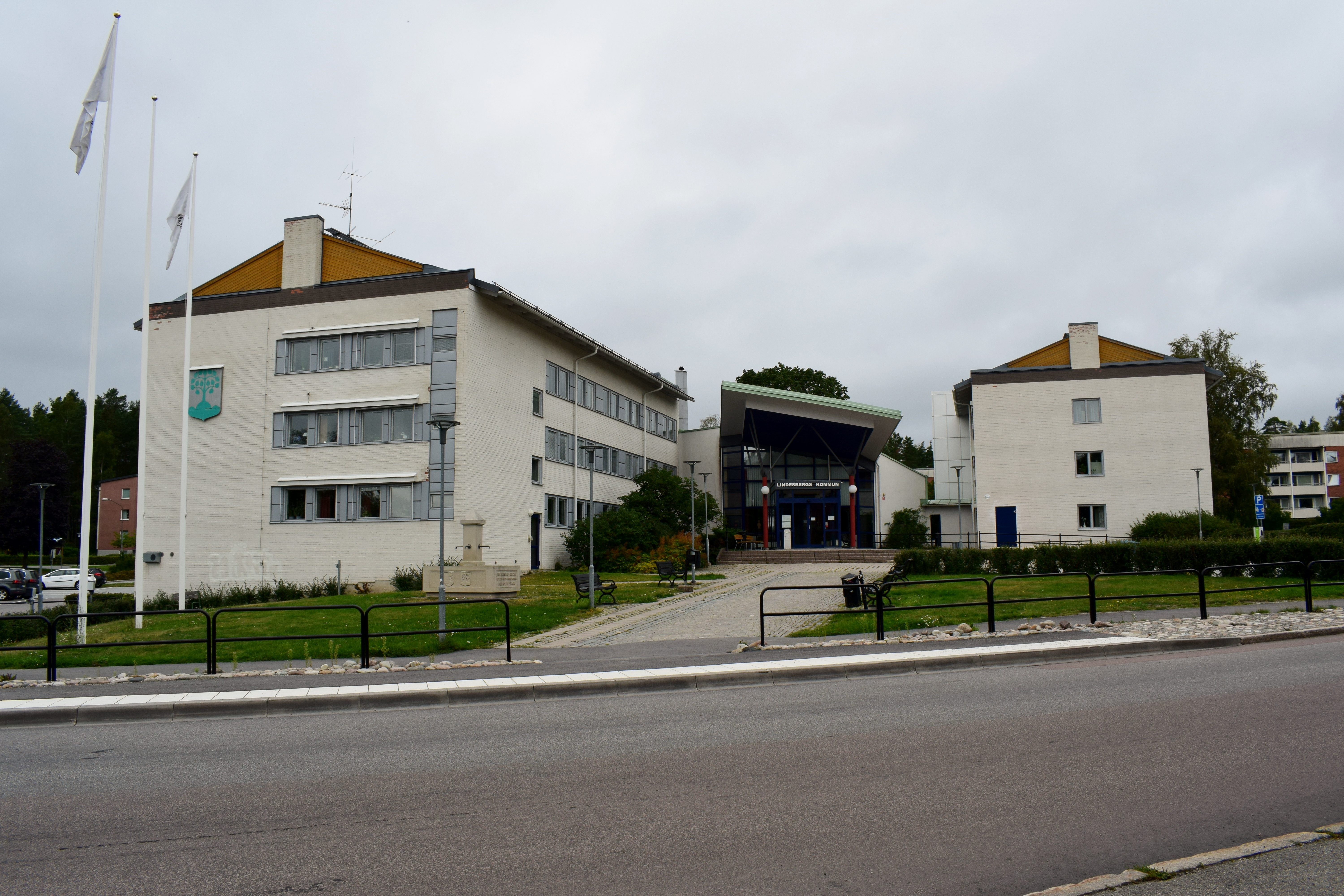 Entré till Lindesbergs kommunhus